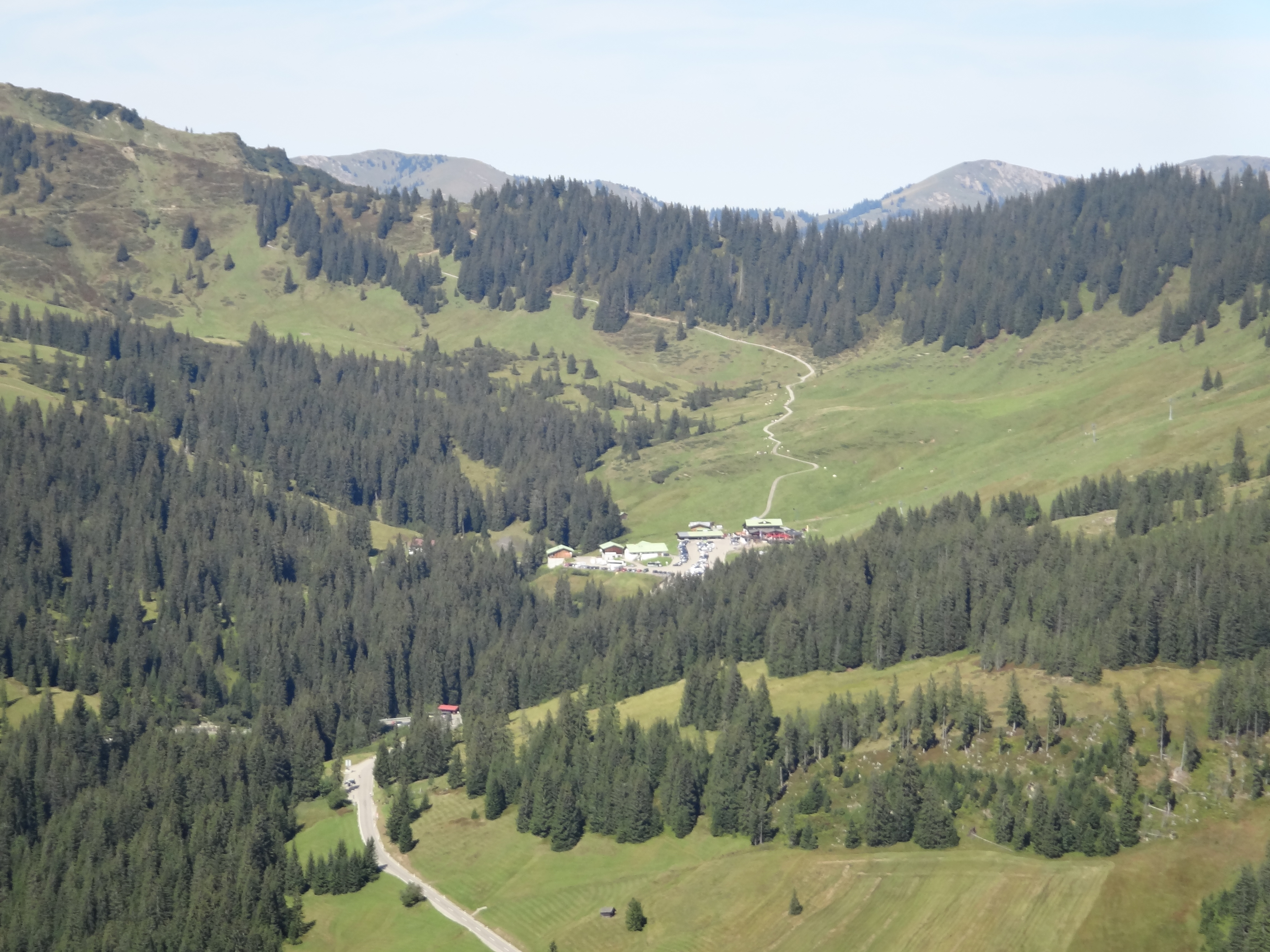 Riedbergpass und Grasgehren